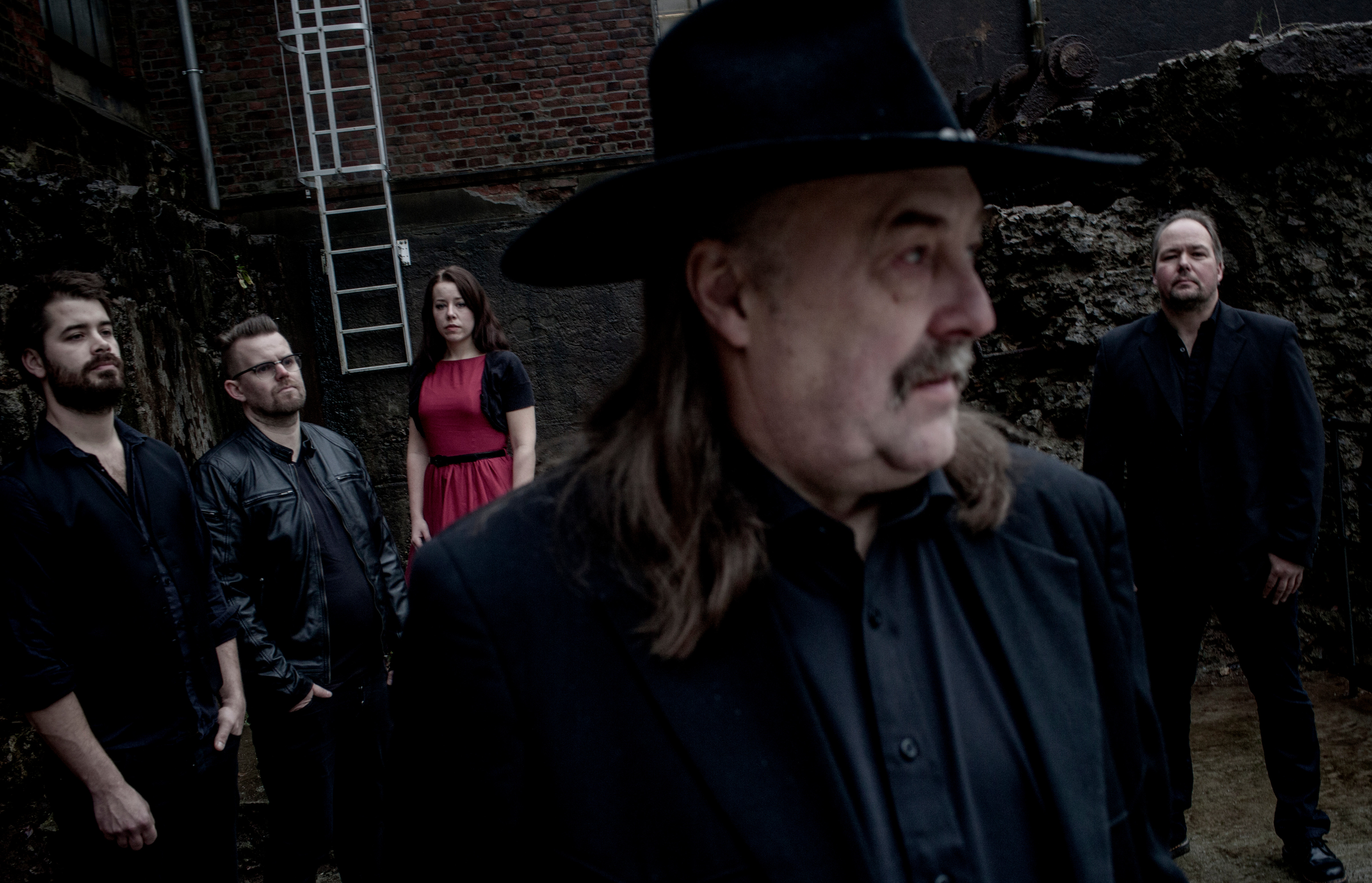 Off. press photo: Marthe Amanda Vannebo